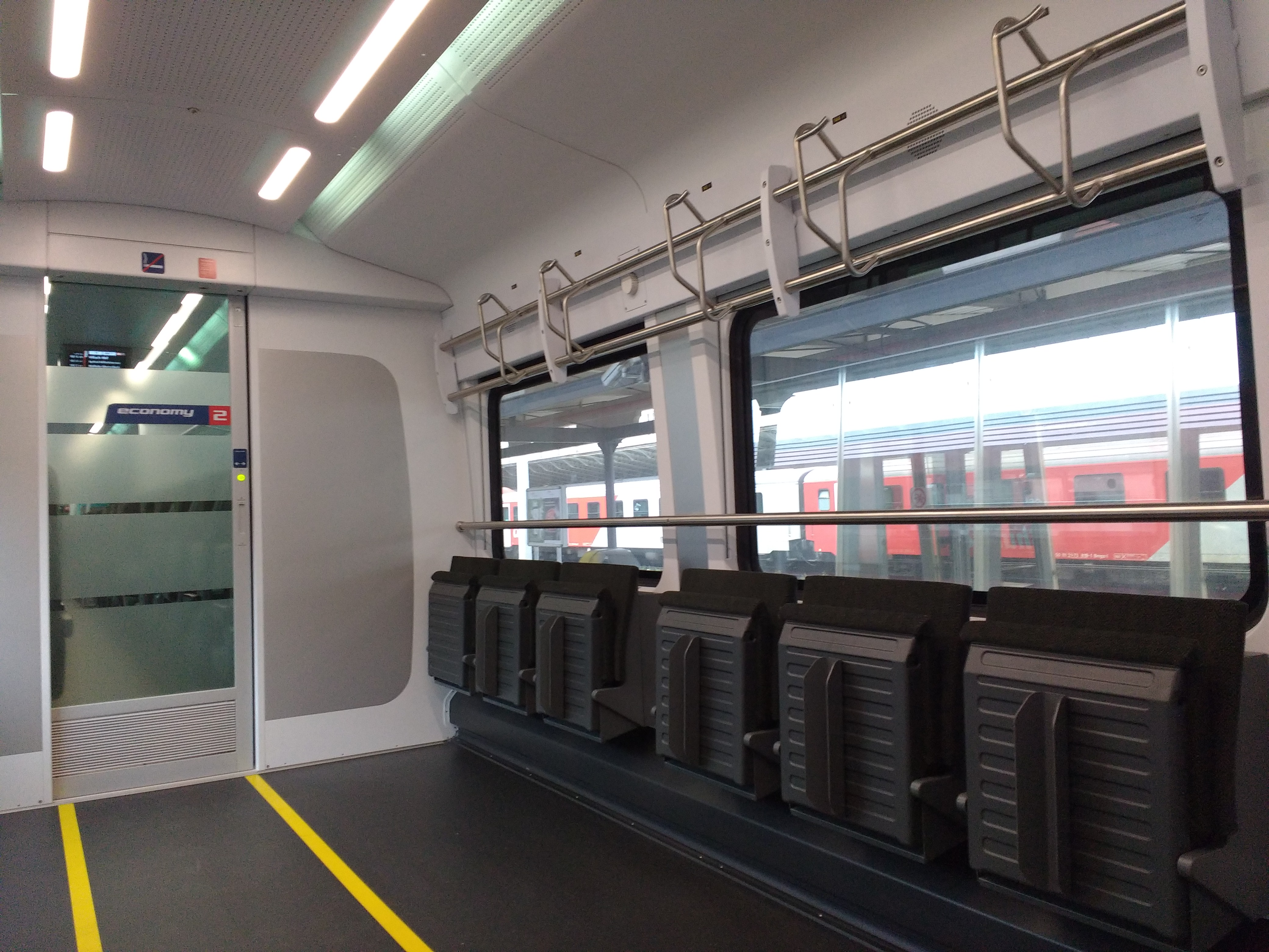 Das Fahrradabteil im Railjet 73 81 84-90 154-9 der ÖBB